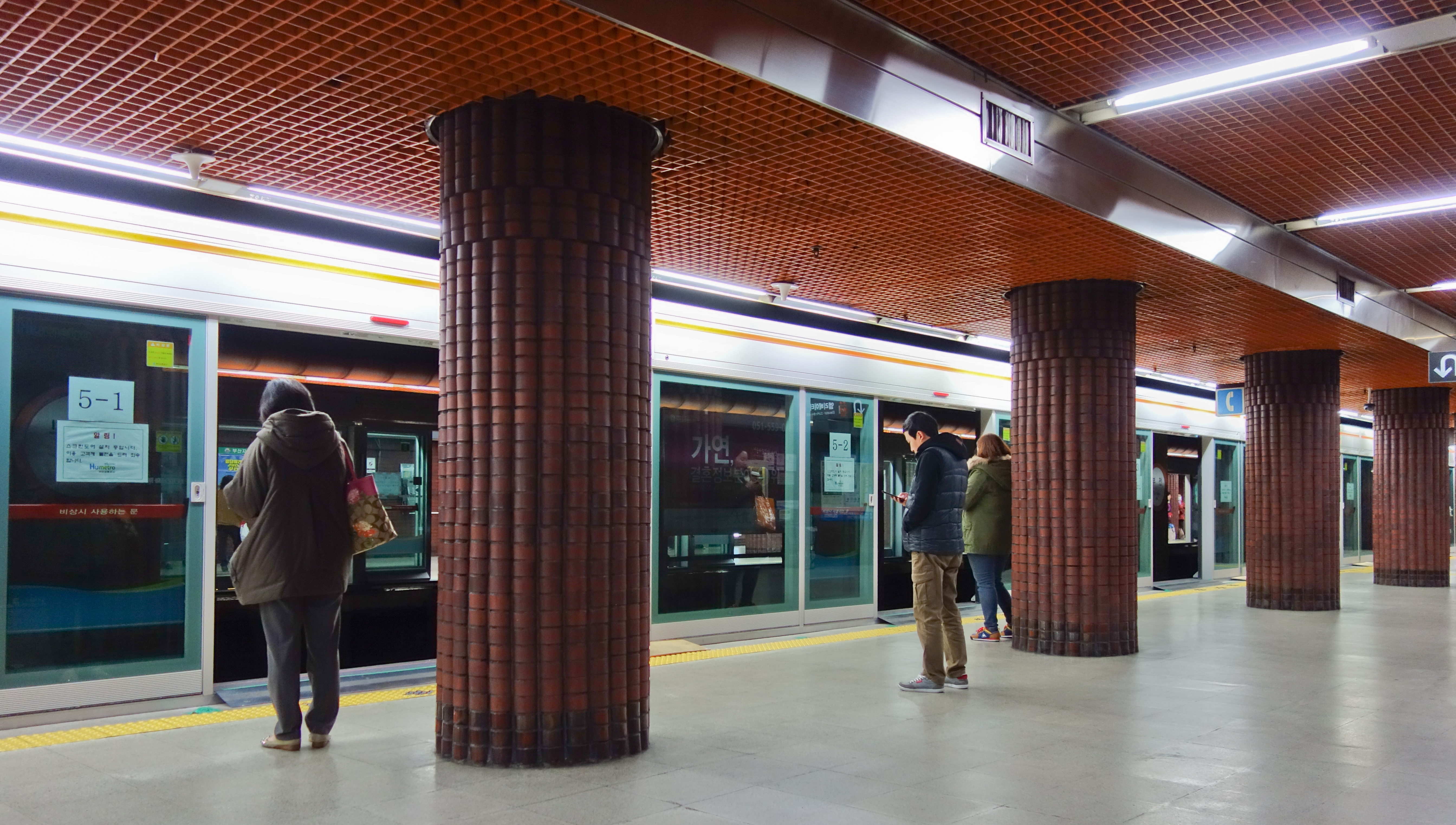 1号線 釜田駅ホーム（なぜかホームドアが開きっぱなしで運用されていた）